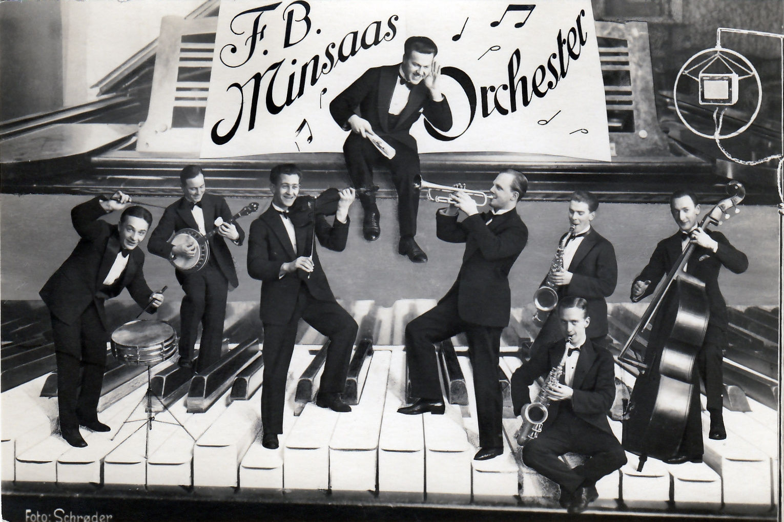 Minsaas' orkester, Palmehaven Britannia Hotel Trondheim, 1930-tallet